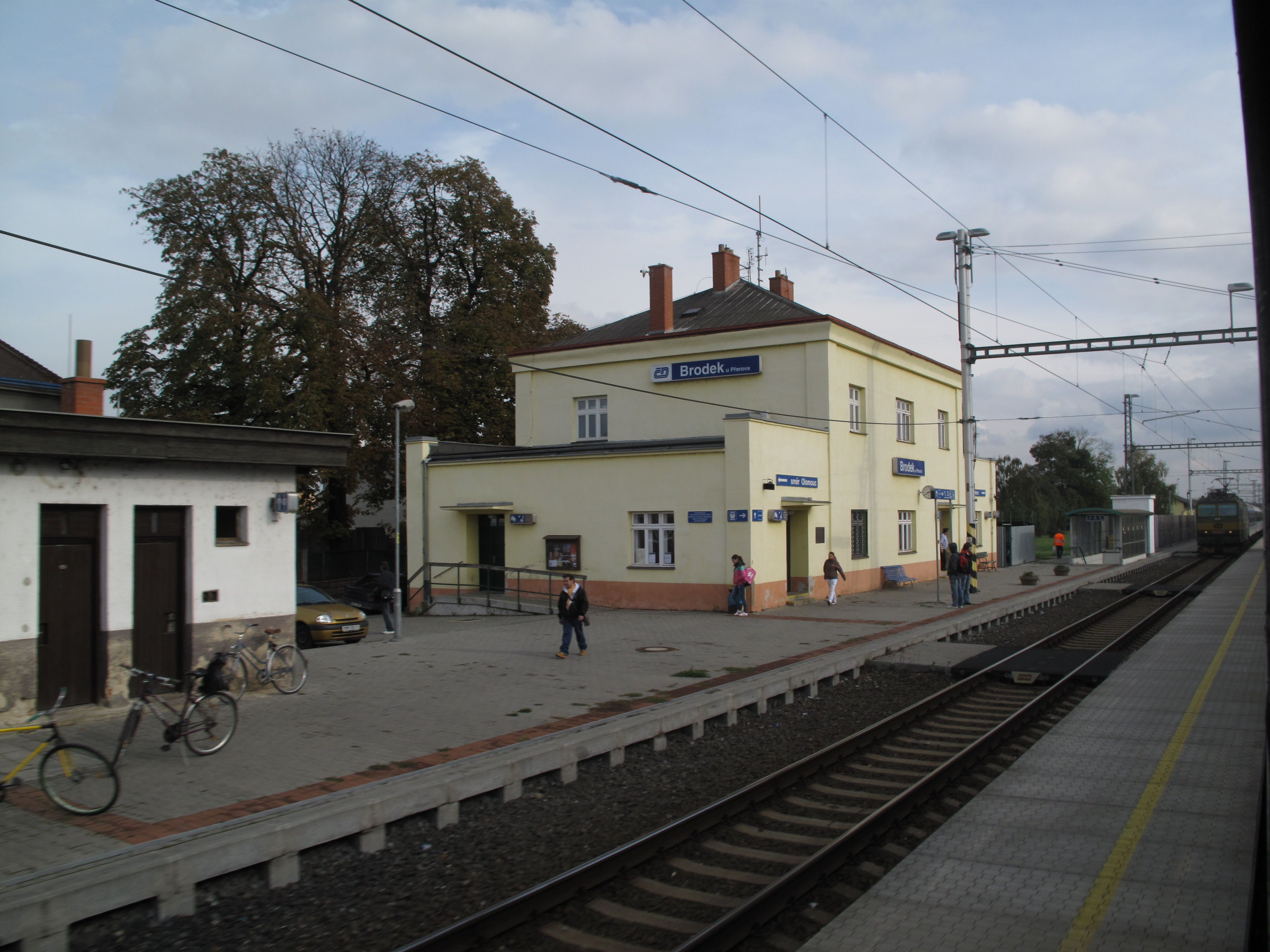 Brodek u Přerova, železniční stanice